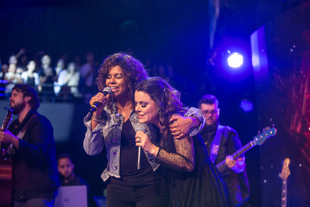 Ana Paula Valadão e Nívea Soares DT19 Álbum Outra Vez, Como Um de Nós